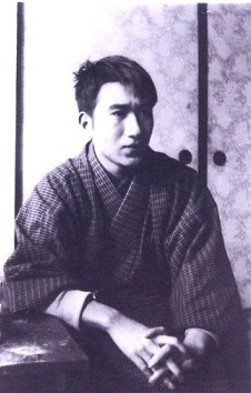 太宰治（1928年頃撮影）